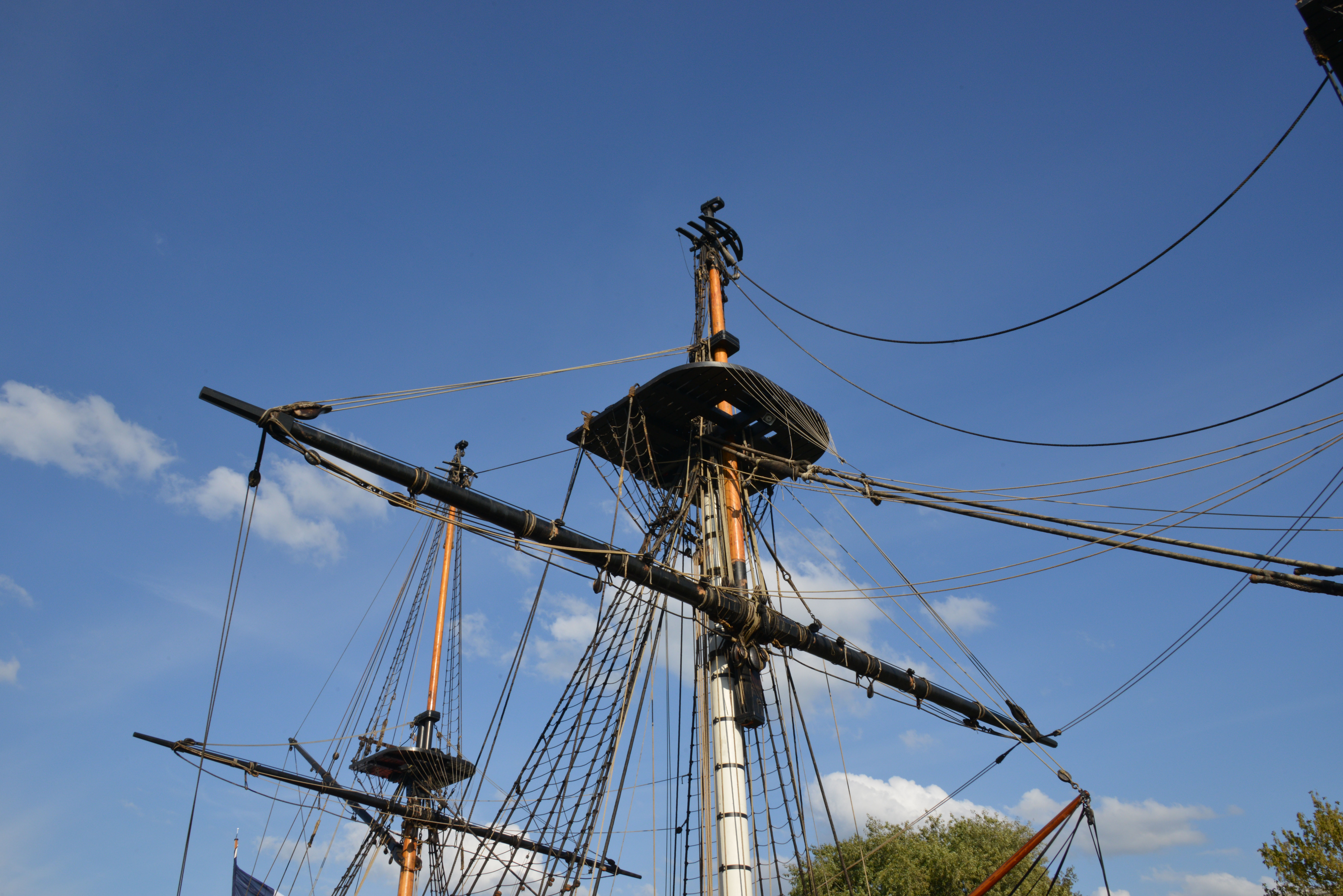 Grand mât, grand mât de hune, hune de grand mât, grand-vergue , puis derrière mât d’artimon, mât de perroquet, hune d’artimon et vergue d’artimon de la frégate l’Hermione. Rochefort-sur-Mer, Charente-Maritime, France.